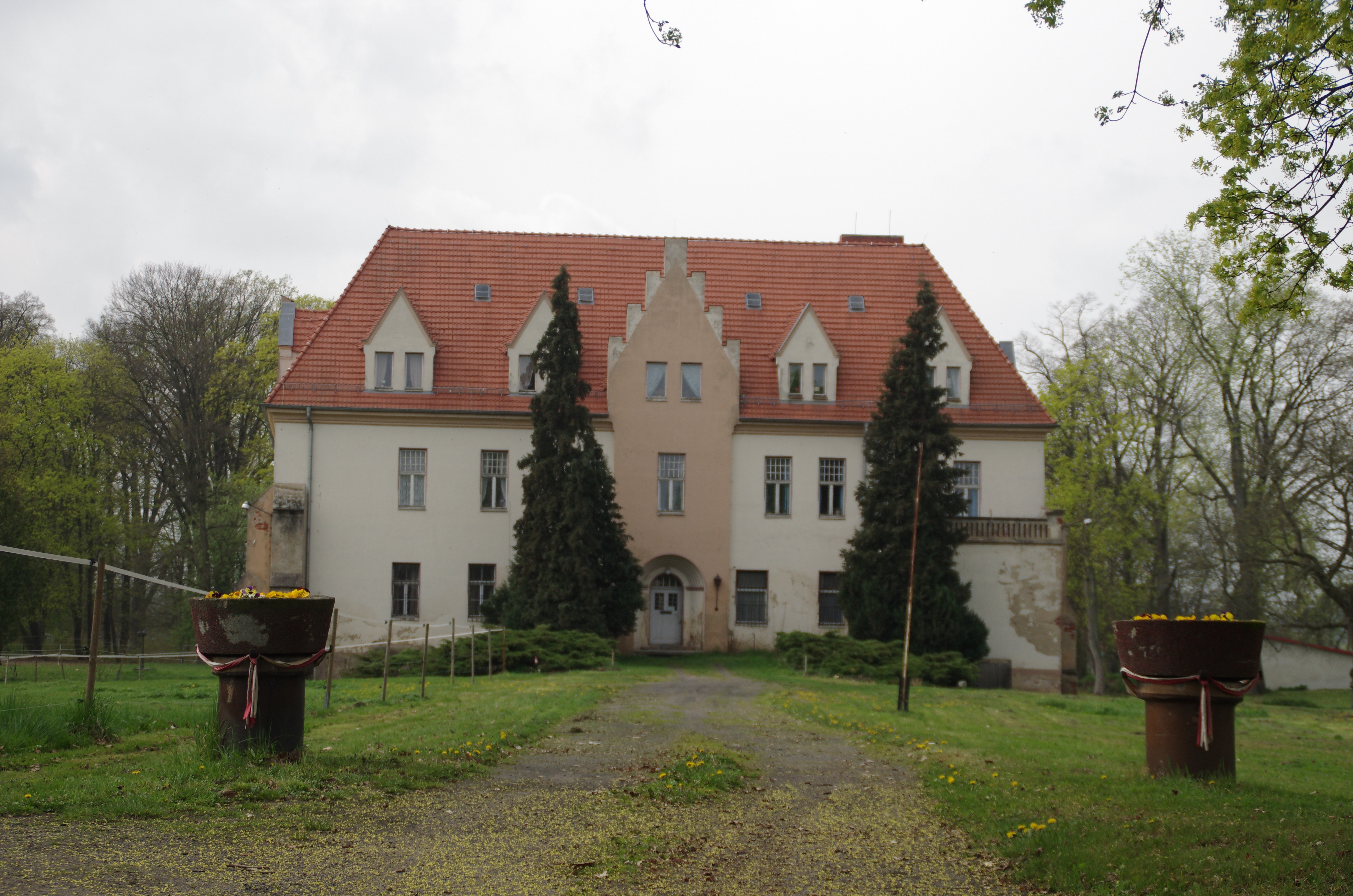 Lebusa in Brandenburg. Das Gebäude auf dem Bild steht unter Denkmalschutz.